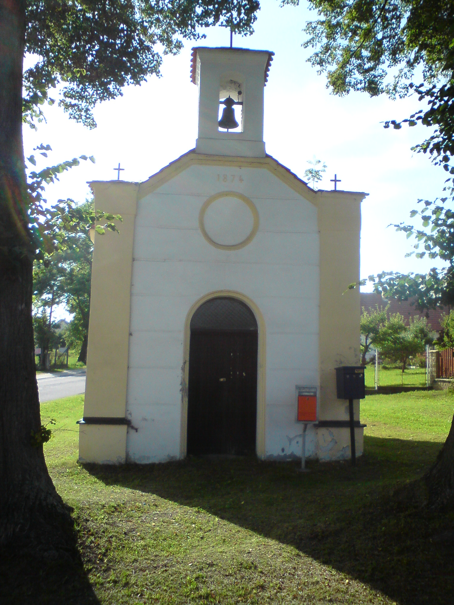 Kaple v Kališti u ČB